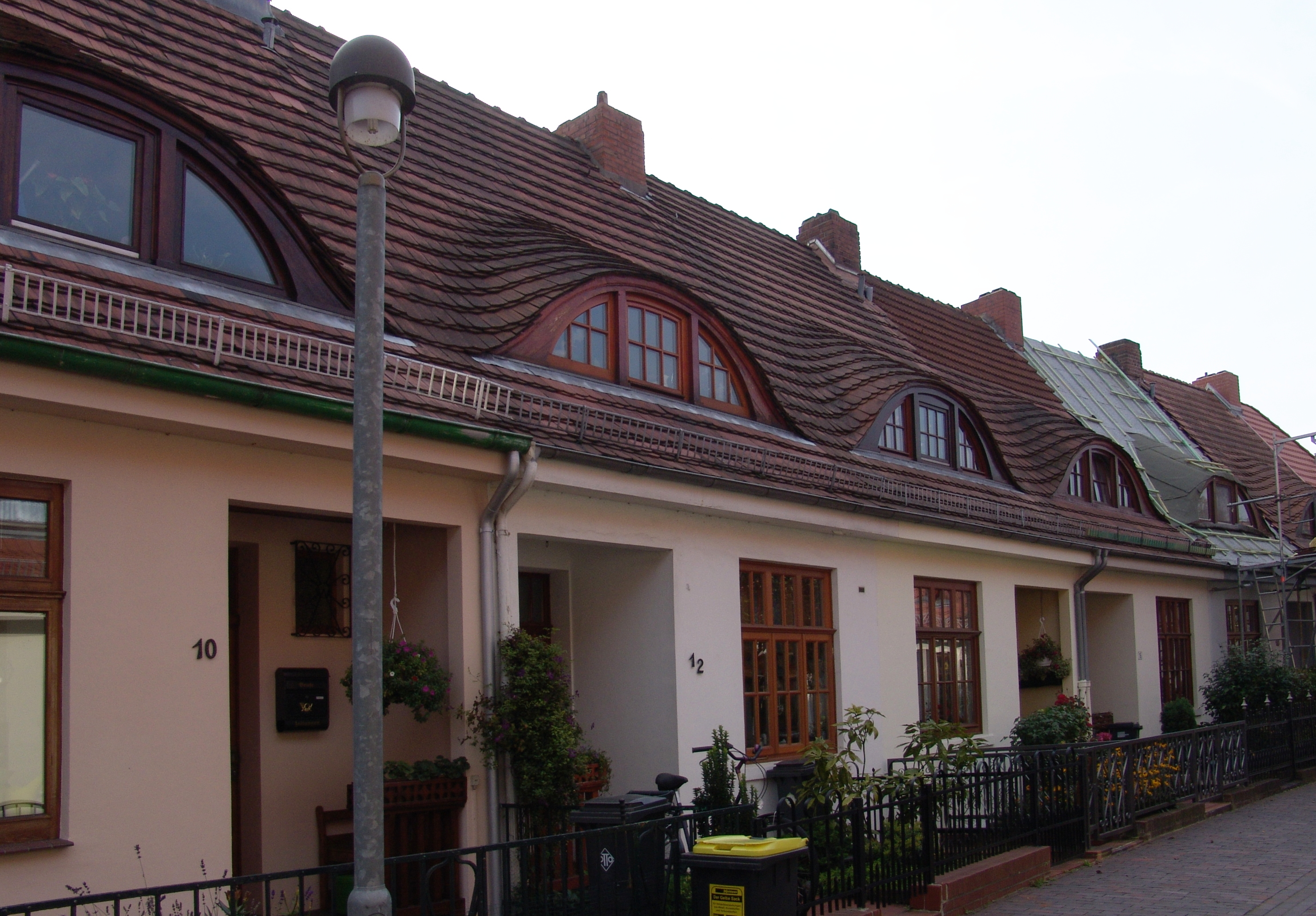 Wohnhaus in Bremen, Feierabendweg 12.Das abgebildete Objekt ist ein geschütztes Kulturdenkmal in der Freien Hansestadt Bremen, mit der Nr. 0373 beim Landesamt für Denkmalpflege registriert.